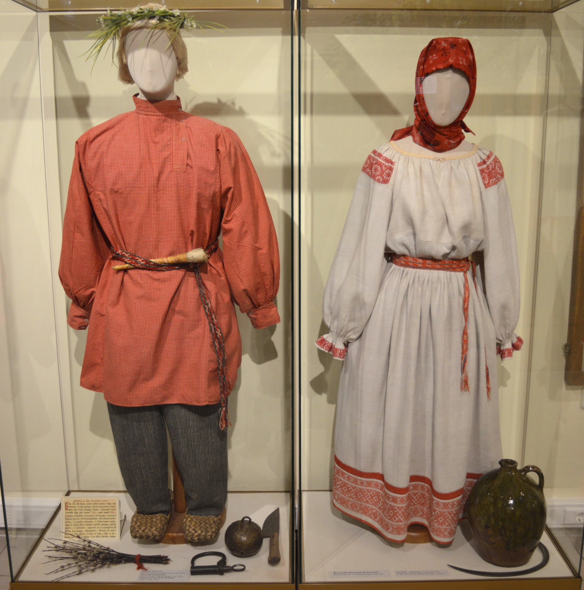 Костюм пастуха. Конец 19 в. Женский жатвенный костюм. Начало 20 в.